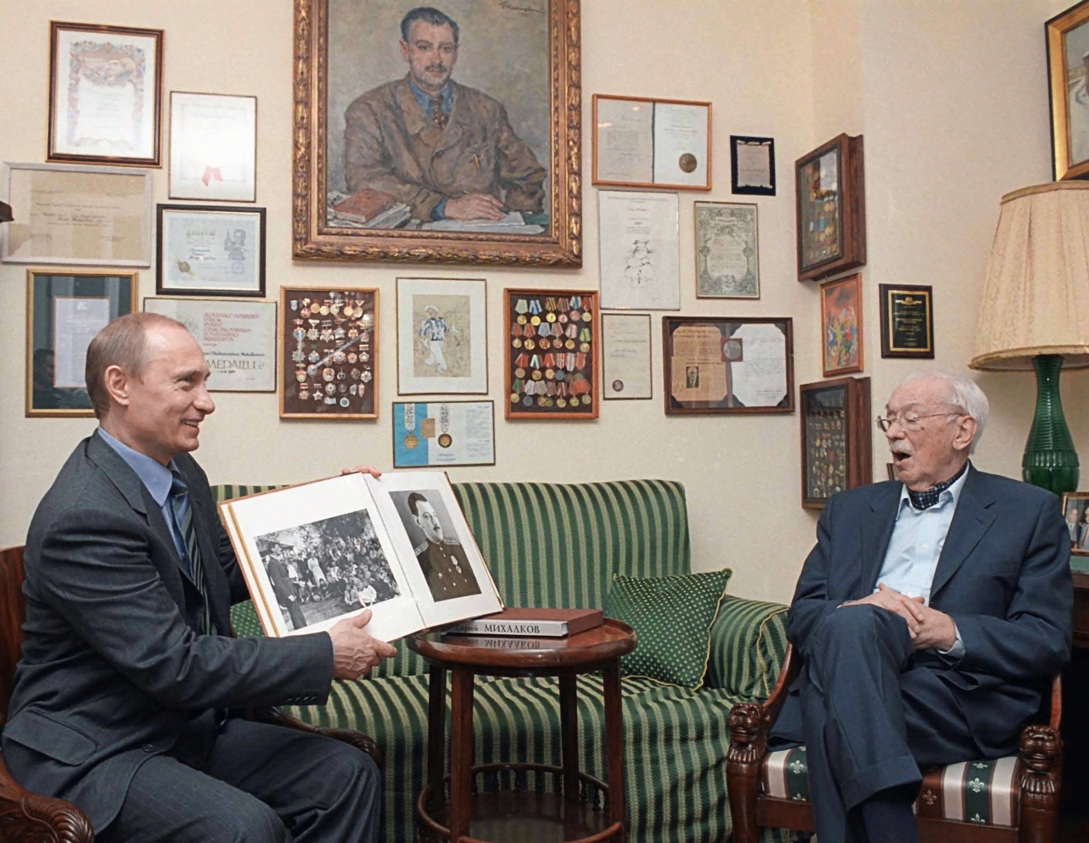 МОСКВА. Владимир Путин подарил Сергею Михалкову альбом с архивными фотографиями.